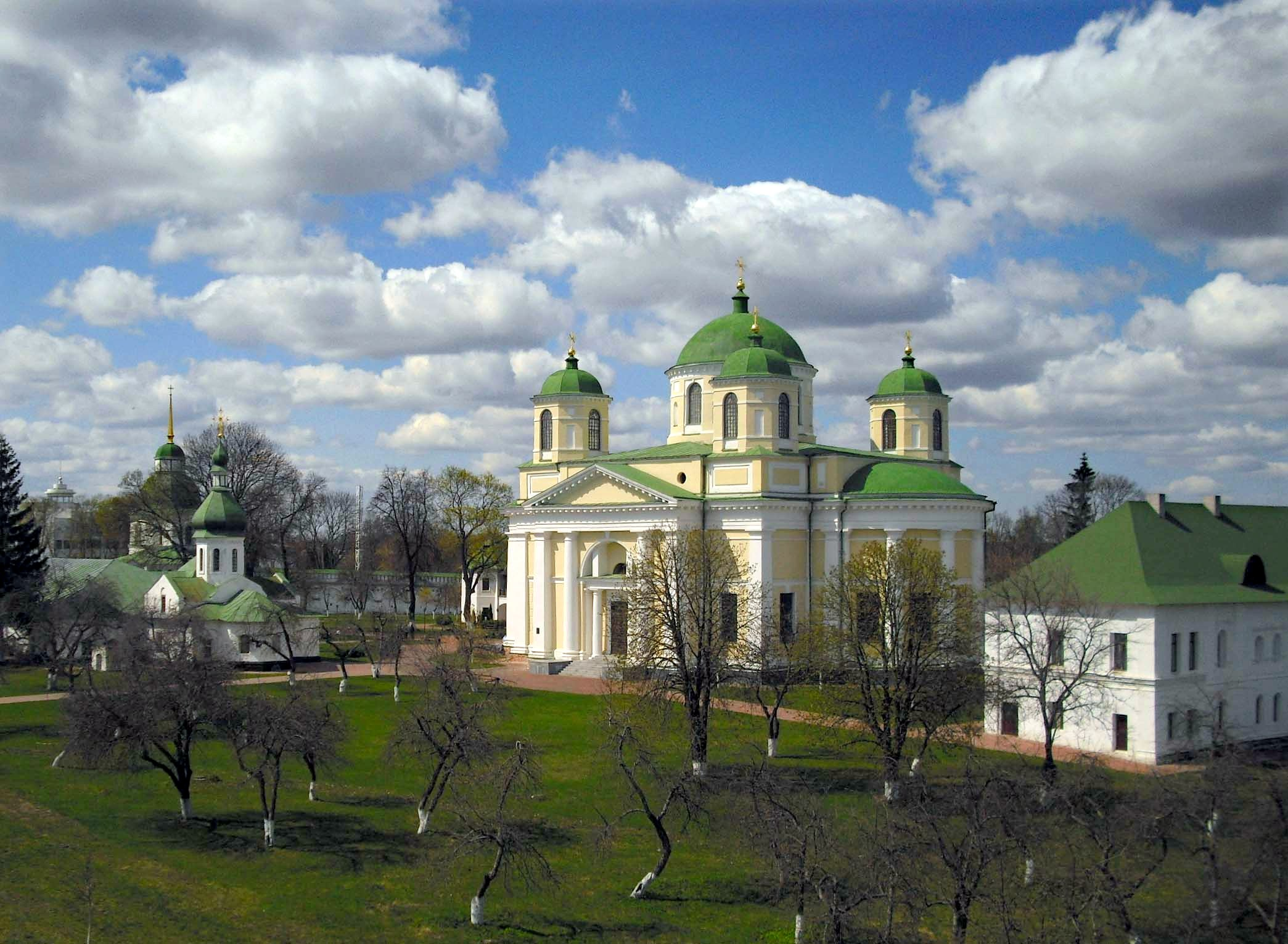 Спасо-Преображенський собор (мур.), Новгород-Сіверський, вул.Пушкiна, 1